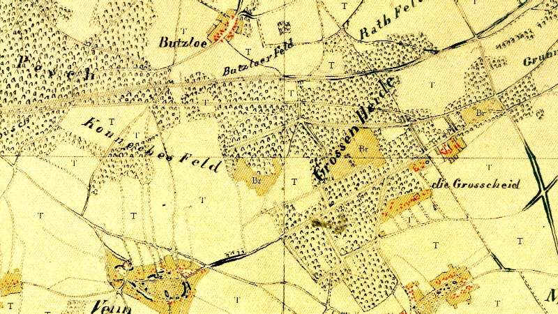 Kartenaufnahme der Rheinlande durch Tranchot und von Müffling, Blatt 42 (Viersen), Ausschnitt mit dem Gebiet des Viersener Ortsteils Bötzlöh und des heute zu Mönchengladbach gehörenden Bereichs von Venn und Großheide.